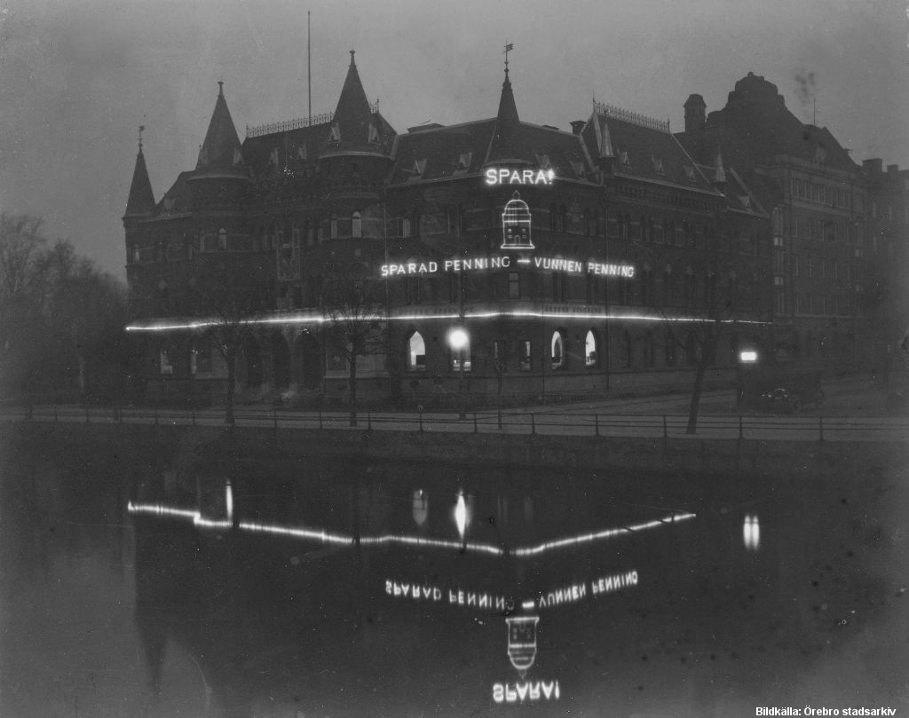 Örebro sparbank med reklambelysning år 1928